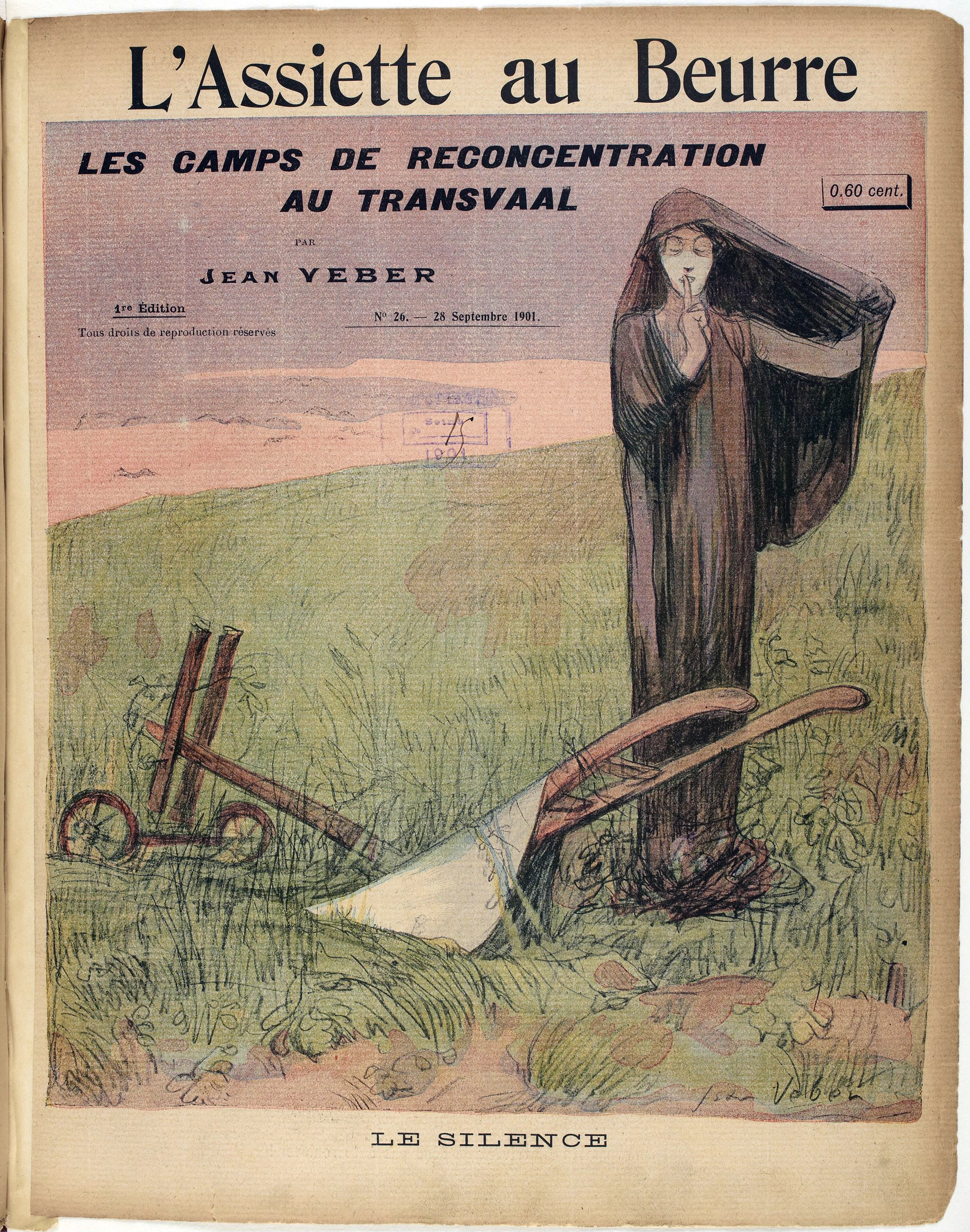 Cover